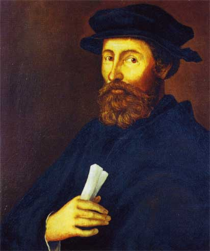 Portret van Dirk Crabeth. Portret van Dirk Crabeth (begin zeventiende eeuw) uit de St. Janskerk te Gouda. N.b. in "Duizend Jaar Gouda" zijn bij de onderschriften de namen "Wouter" en "Dirk" verwisseld! Zie: (Groene Hart Archieven) hier voor de goede informatie streekarchief.